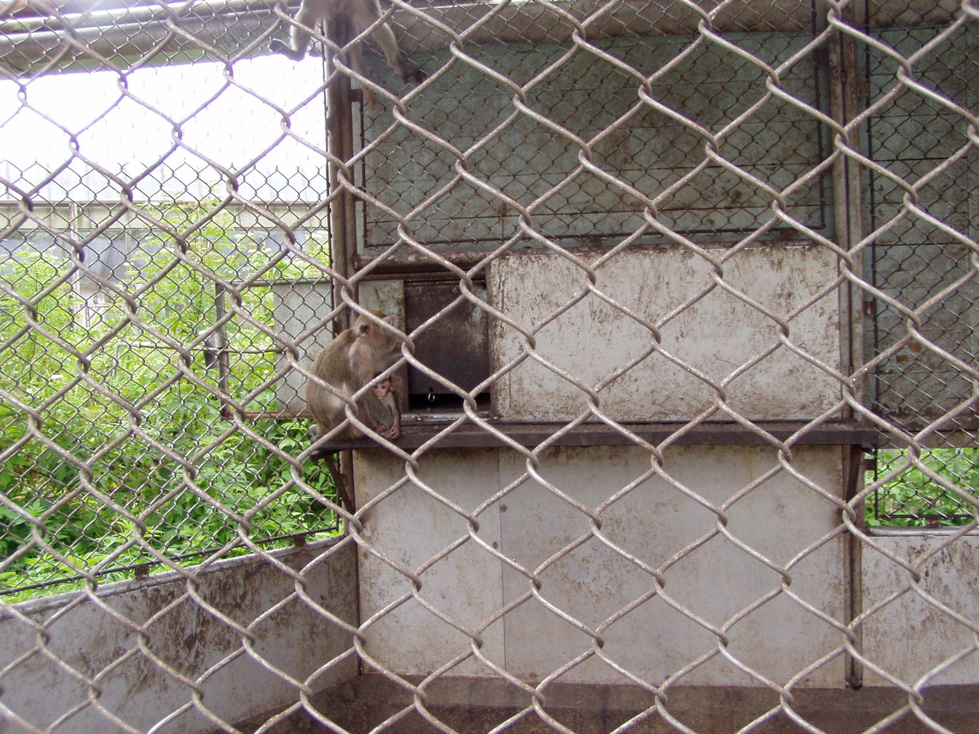 Вольер с макаками-резус в Научно-исследовательском институте медицинской приматологии